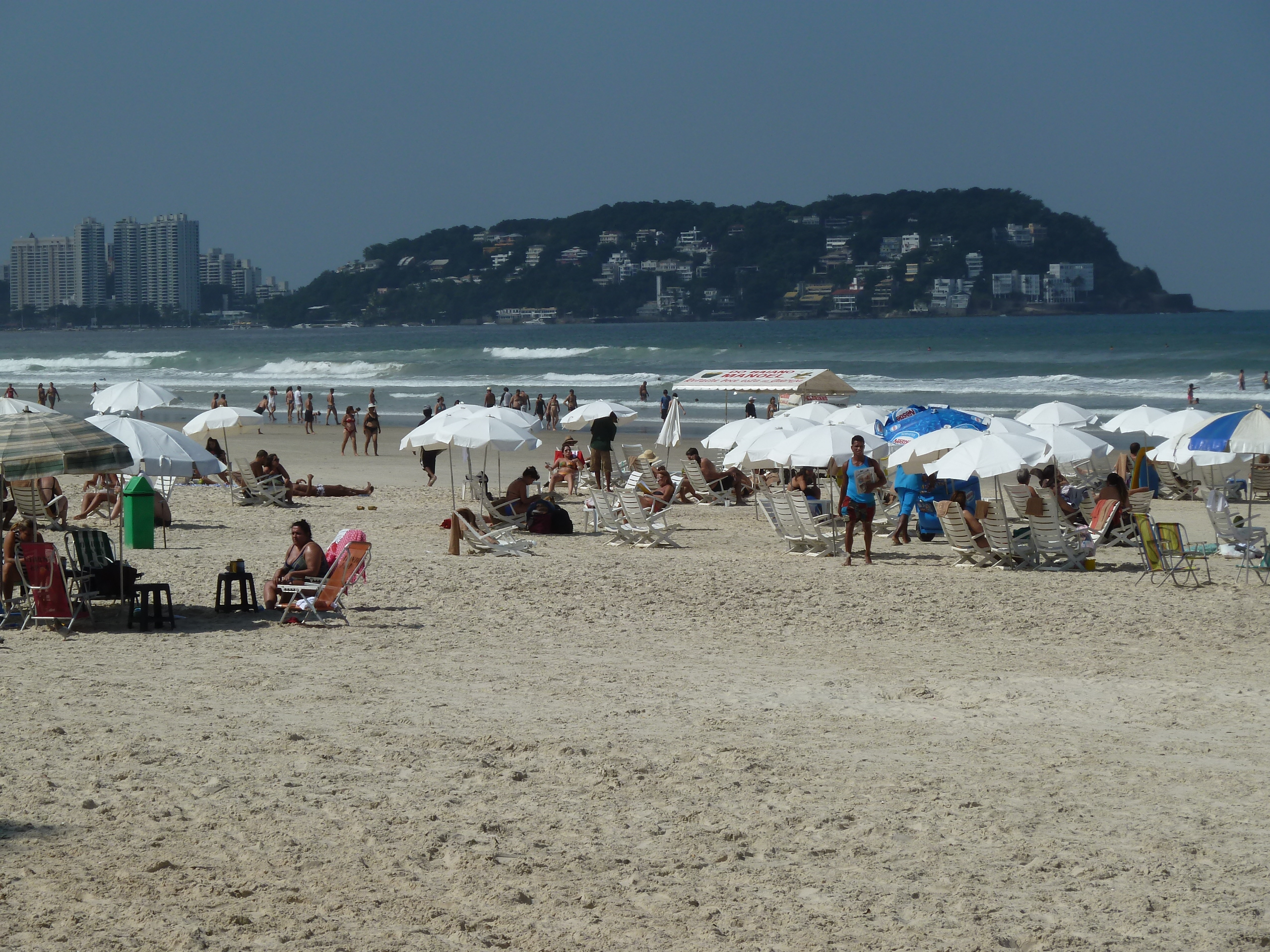 Praia da enseada e Morro da Península, Guarujá, São Paulo